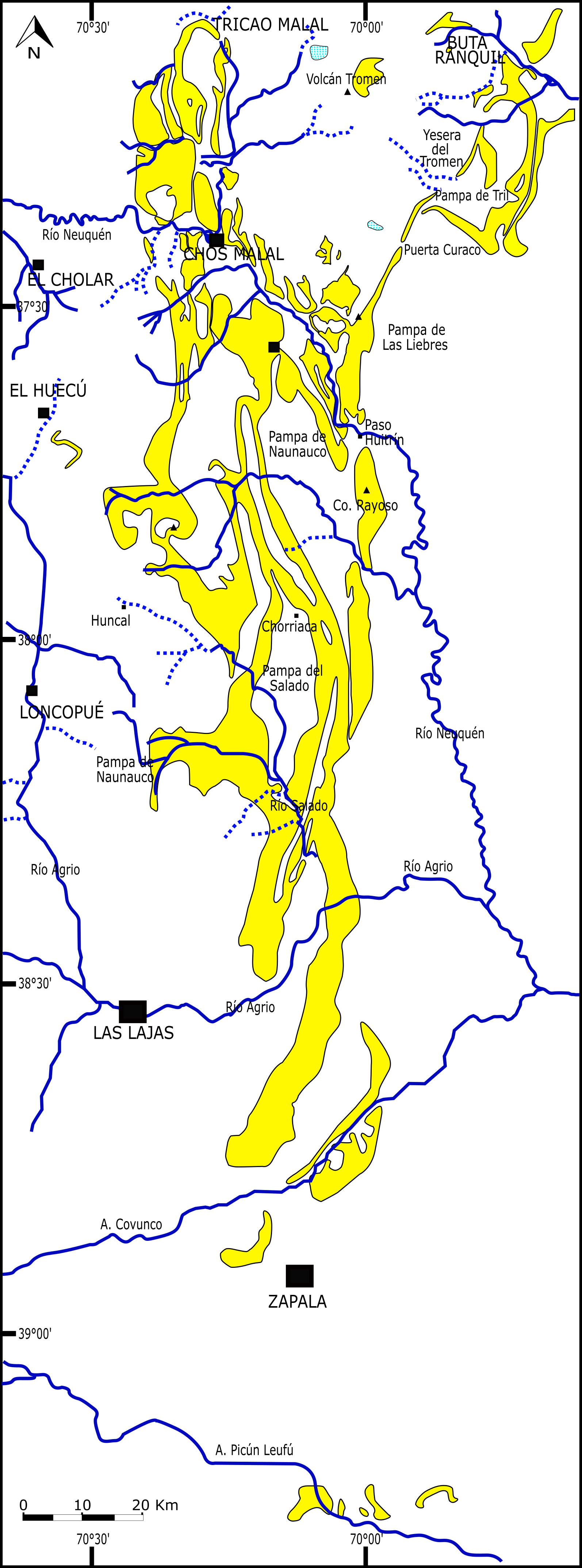 Mapa de los afloramientos de la Formación Agrio (Cretácico inferior) en la Cuenca Neuquina. Tomado del trabajo de Spalletti et al 2011.